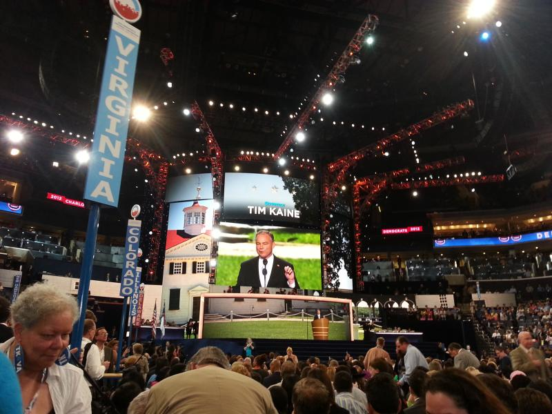 2012dncconvention-187